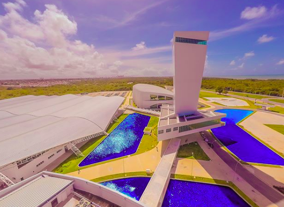 Torre do Mirante no Centro de Convenções de João Pessoa, Paraíba